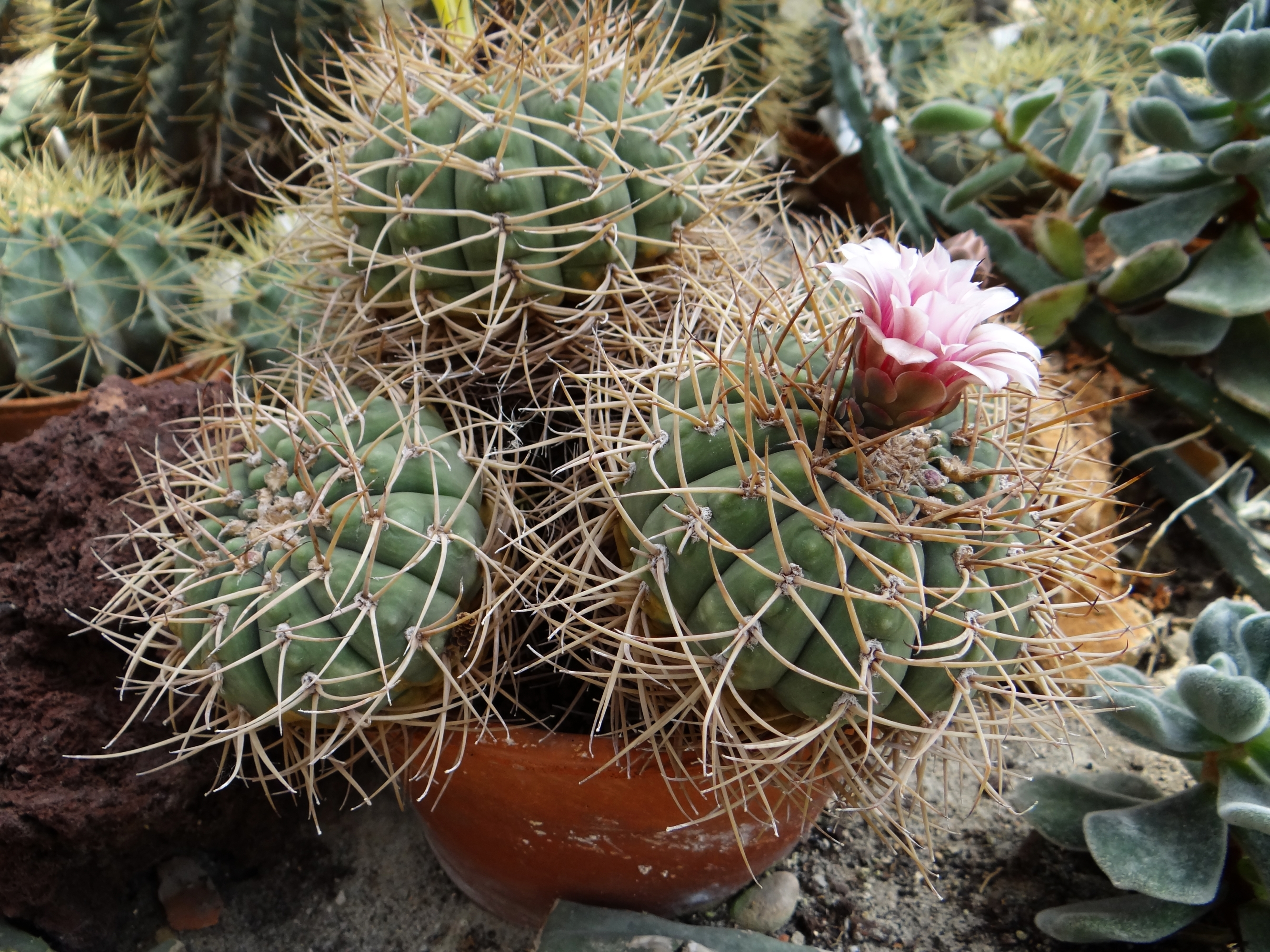 Gymnocalycium spegazzinii subsp. cardenasianum (location:Botanical Garden in Cracow)